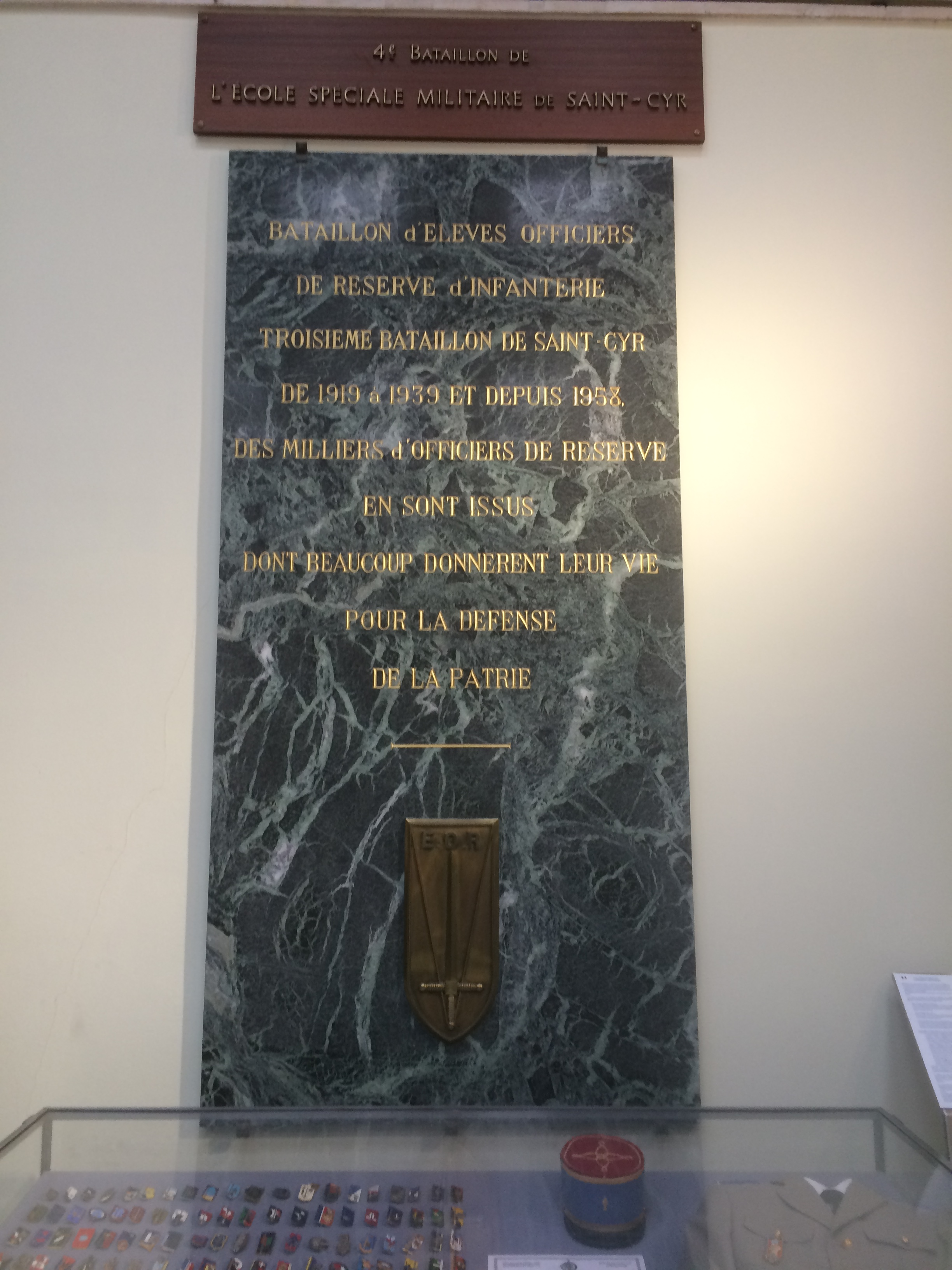 Présentation de la formation EOR/4° Bataillon de l'ESM de Saint-Cyr à Coetquidan à l'intérieur du Musée du souvenir des écoles en 2019